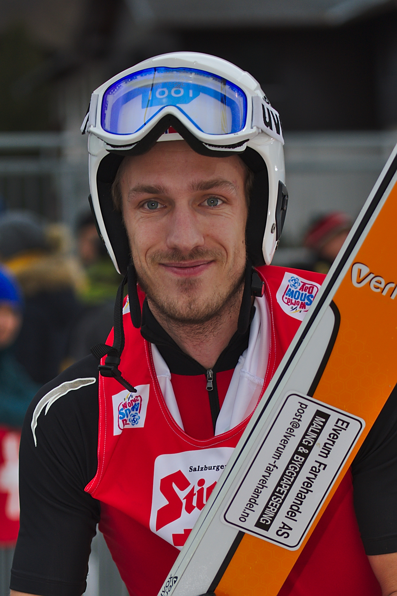 FIS Worldcup Nordic Combined Ramsau 2016. Bild zeigt Truls Sønstehagen Johansen (NOR)